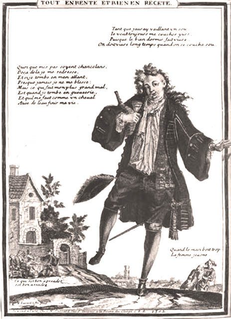 Jeune homme oisif ivre une bouteille de champagne à la main